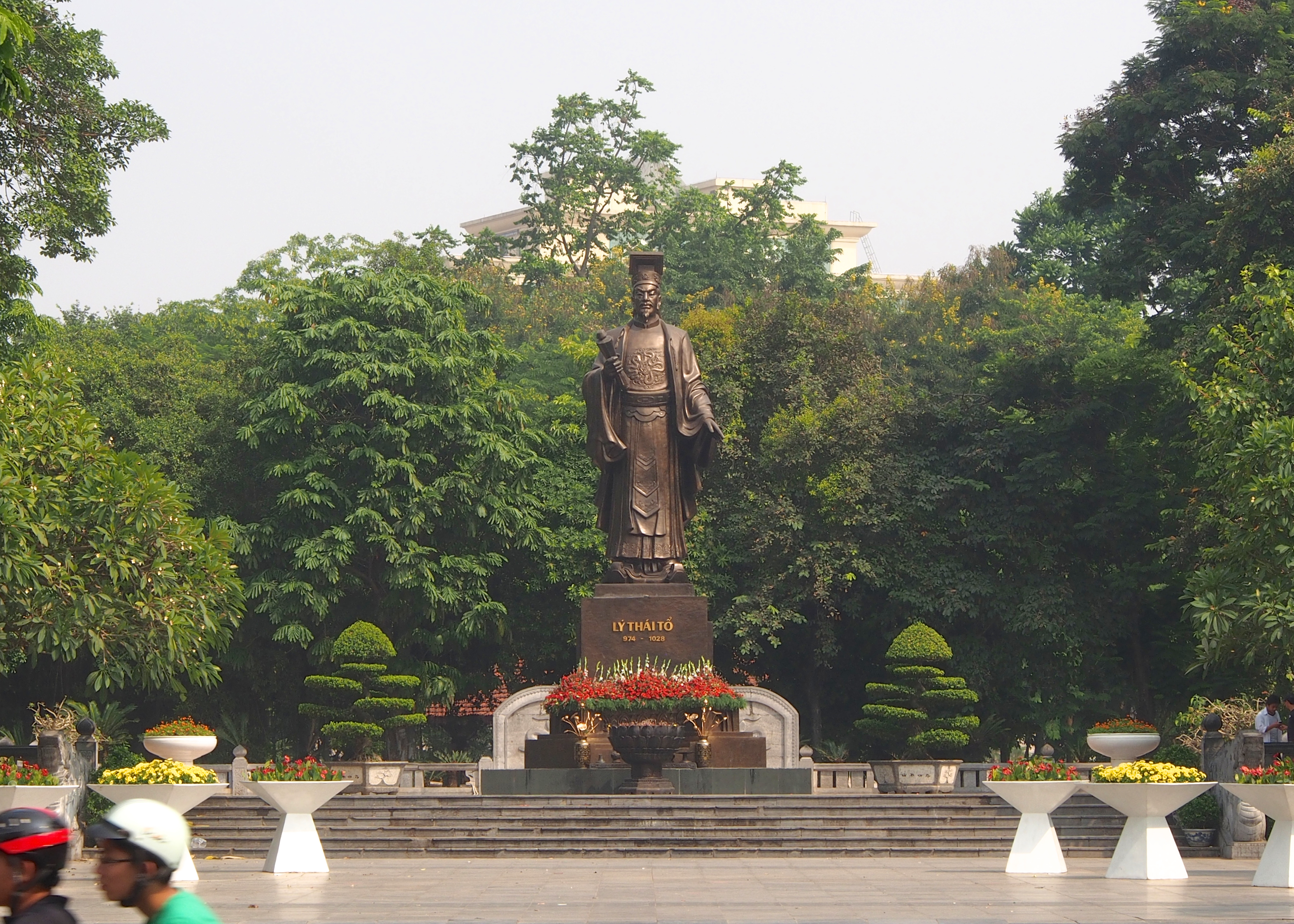 Tượng đài Lý Thái Tổ, Hà Nội, Việt Nam.